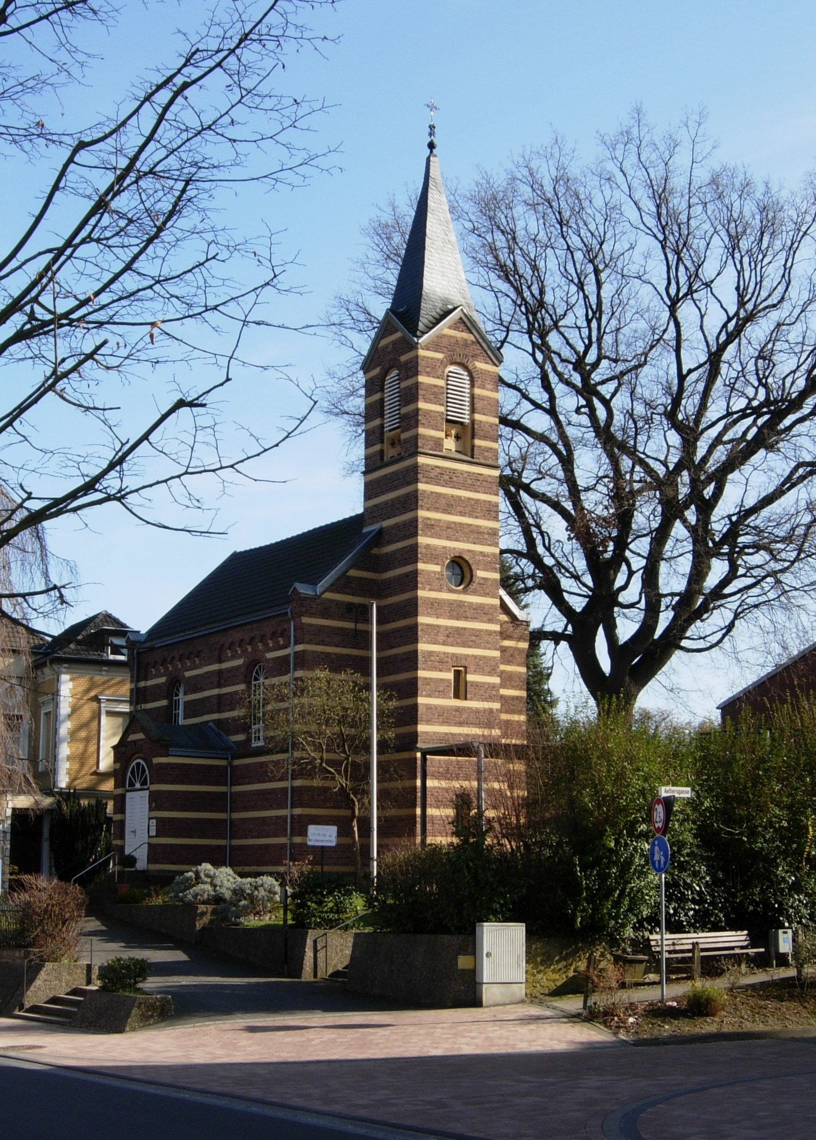 Neoromanische Kirche in Bornheim an der Königstraße (Ecke Aeltersgasse), nach Entwürfen des Bonner Kommunal- und Stadtbaumeisters Paul Richard Thomann (1827 – 1873) errichtet (Baubeginn 1863, Einweihung 1866); auffällig ist die italienisch anmutende gelbe Bänderung. Thomann plante auch den Bau der 1938 von Nazis zerstörten Synagoge (Königstraße 55, nahe Heinestraße), der katholischen Servatiuskirche (Baubeginn 1864, Einweihung 1866) und des Breniger Stationenwegs. Näheres zu Thomann. This image shows a heritage building in Germany, located in the North Rhine-Westphalian city Bornheim (Rheinland) (no. 27).